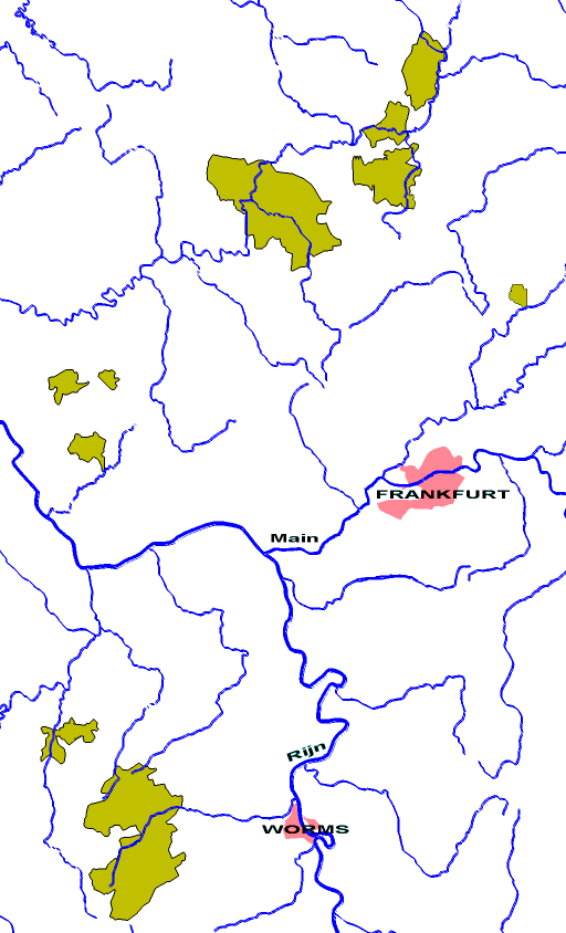 Nassau-Weilburg in 1789 - zelf gemaakt op basis van een andere kaart